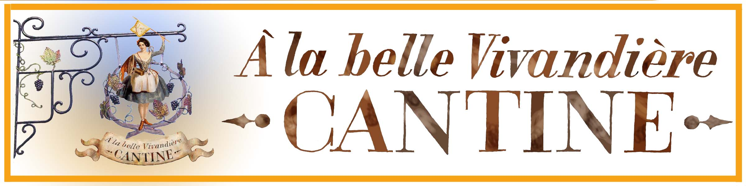 Bandeau pour le portail Alimentation et Gastronomie de Wikipedia France